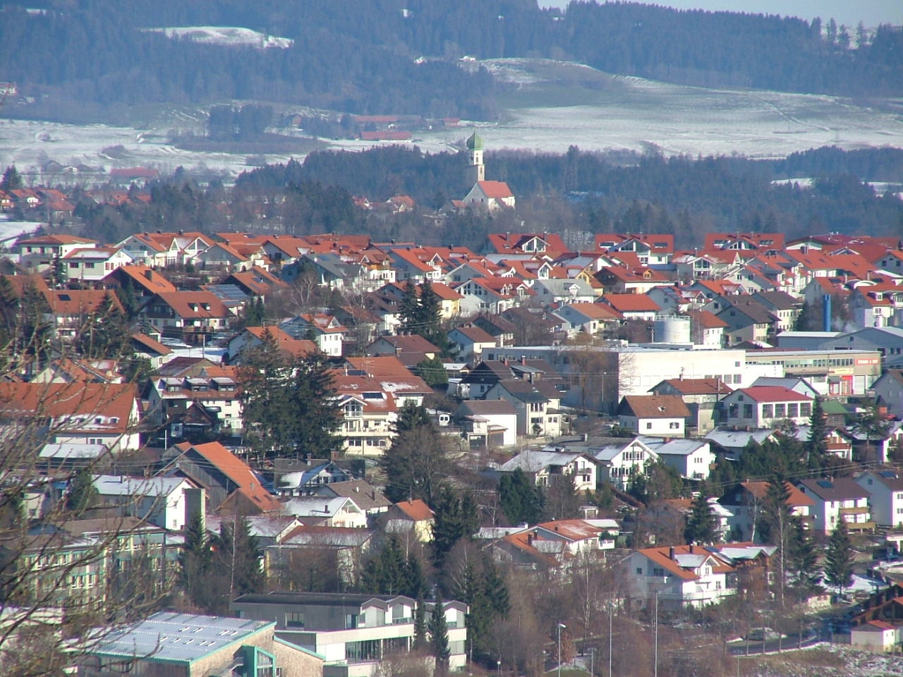 Altusried,Foto von Richard Mayer